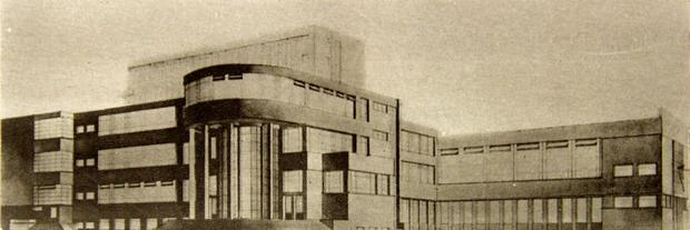 Праект Дзяржаўнай бібліятэкі імя Леніна — яскравы ўзор савецкага канструктывізму. Архітэктар Лаўроў для бібліятэчнага комплексу спраектаваў таксама дзевяціпавярховае кнігасховішча (высокі аб'ём на заднім плане малюнка), але яго задумка не была рэалізавана. Хоць у выпадку ўзвядзення кнігасховішча магло на дзесяцігоддзі стаць самым высокім будынкам Мінска